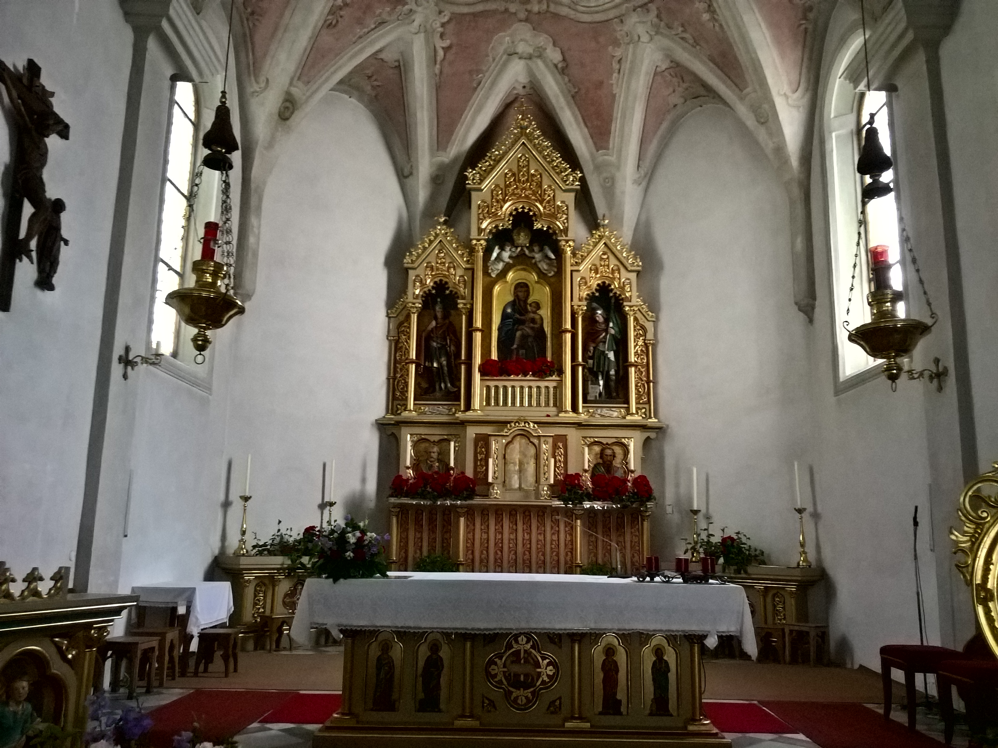 St. Georg in Tiers, Südtirol